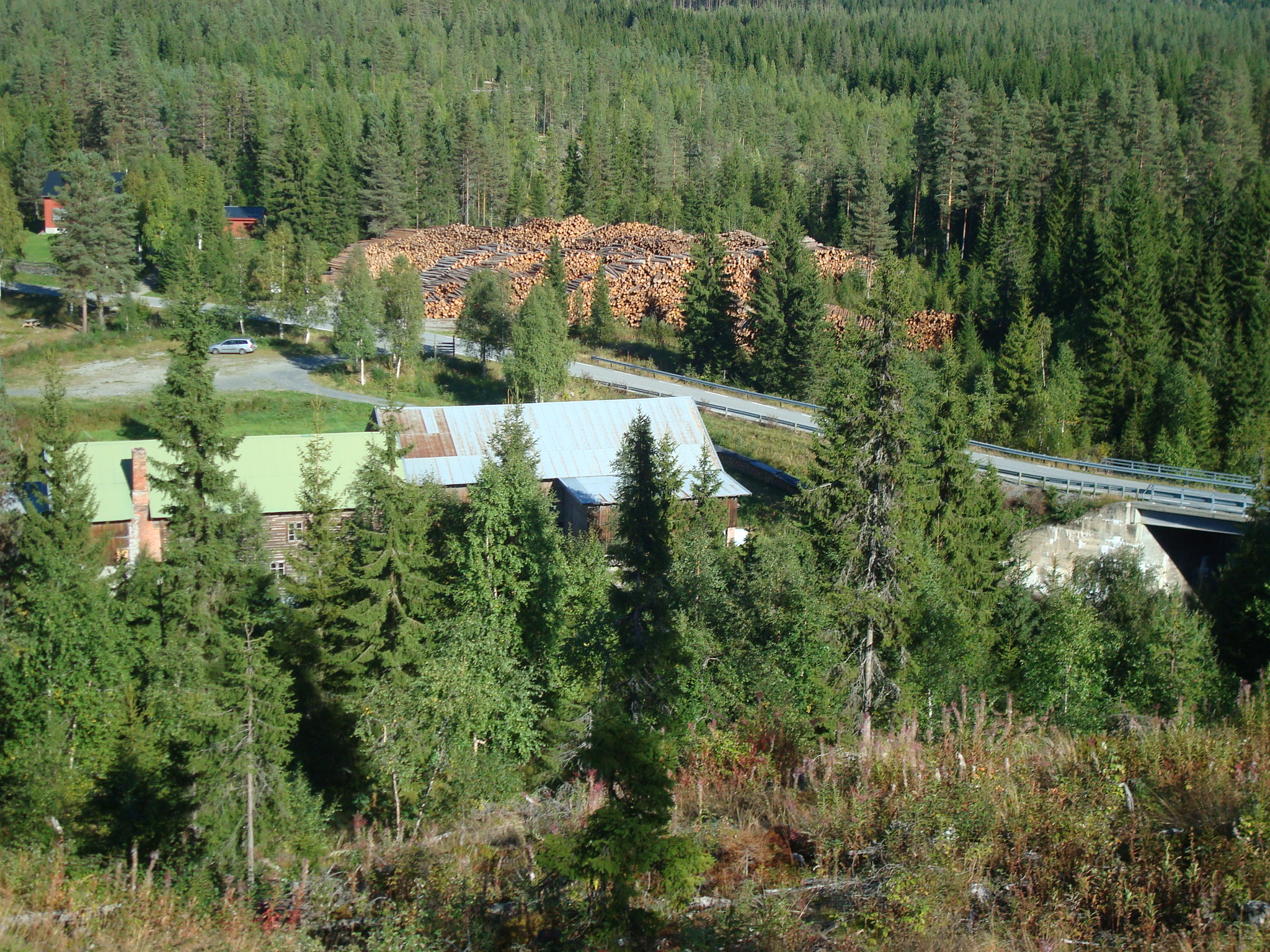 Grønvold sag og mølle i Torpa